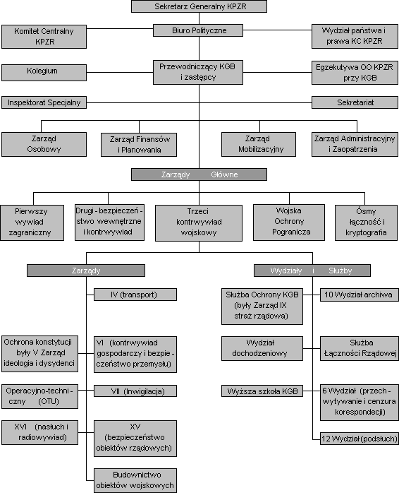 Struktura organizacyjna Komitetu Bezpieczeństwa Państwowego (KGB ZSRR). Źródło: Desmond Ball i Robert Windren, Soviet Signals Intelligence (Sigint): Organization and Management; Intelligence and National Security , tom IV (1989), nr 4; Christopher Andrew oraz Oleg Gordijewski, KGB: The Inside story of its Foreign Operations from Lenin to Gorbachev, wydanie książkowe, Londyn, Sceptre, 1991 oraz Mitrochin.